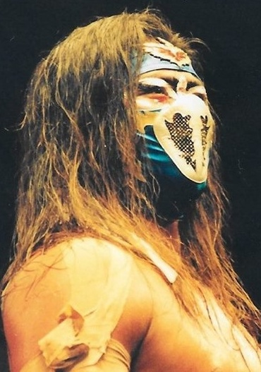 FMW-ハヤブサ選手